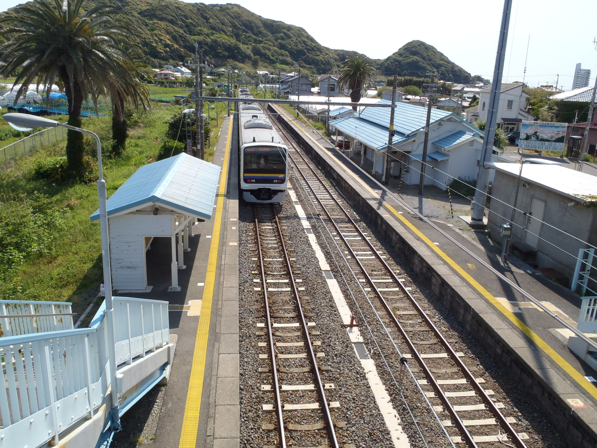 江見駅 / Emi Stacio